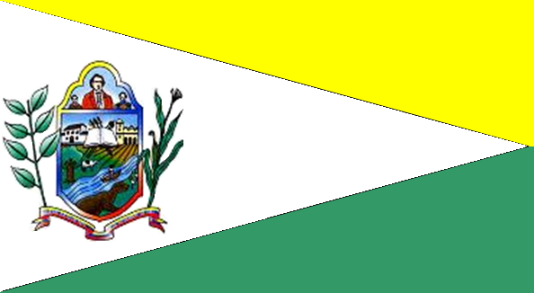 Bandera del municipio Sosa, estado Barinas, Venezuela